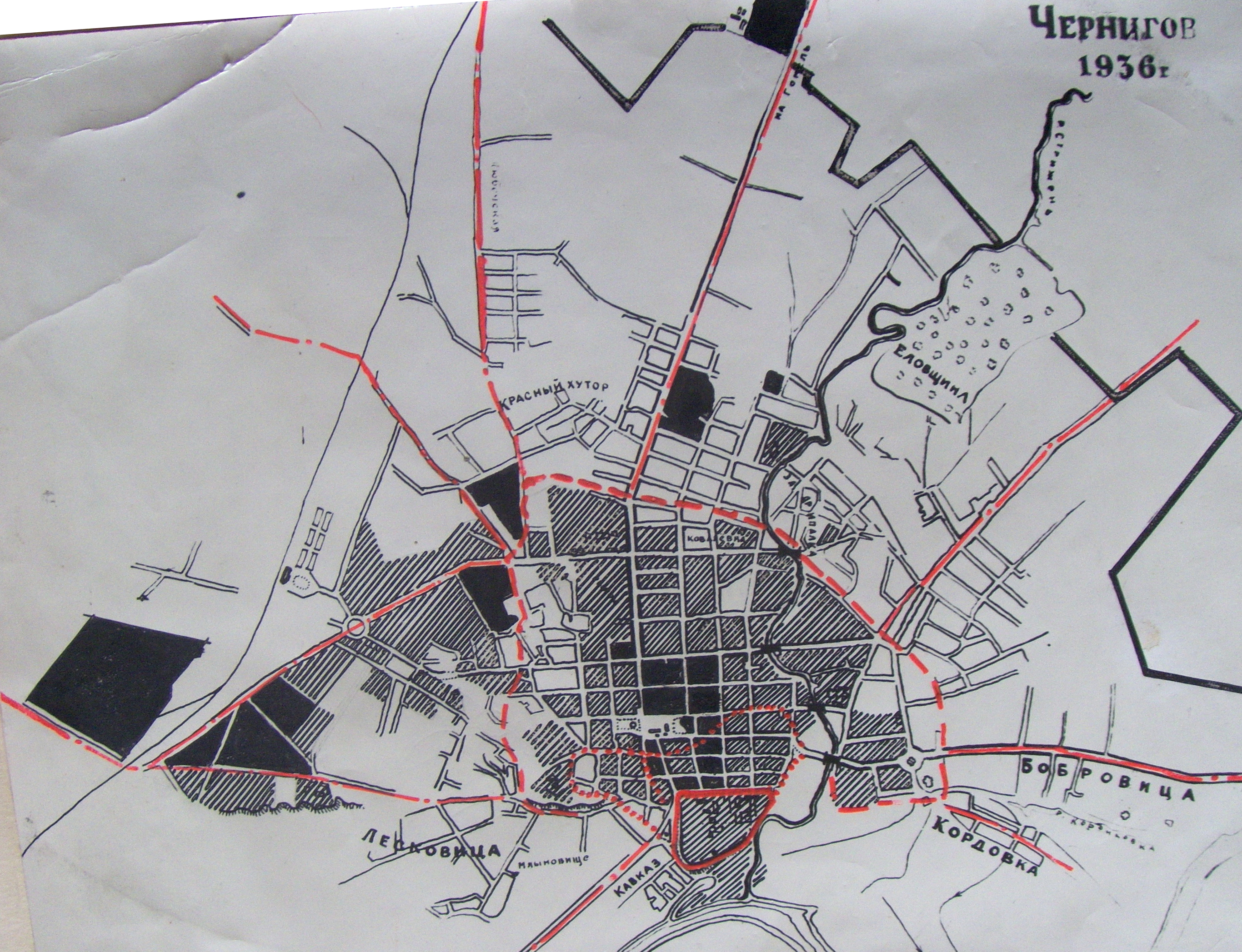 Схема зони руйнувань Чернігова внаслідок авіабомбардувань 23-25 серпня 1941 р. Створена на плані Чернігова 1936 р.